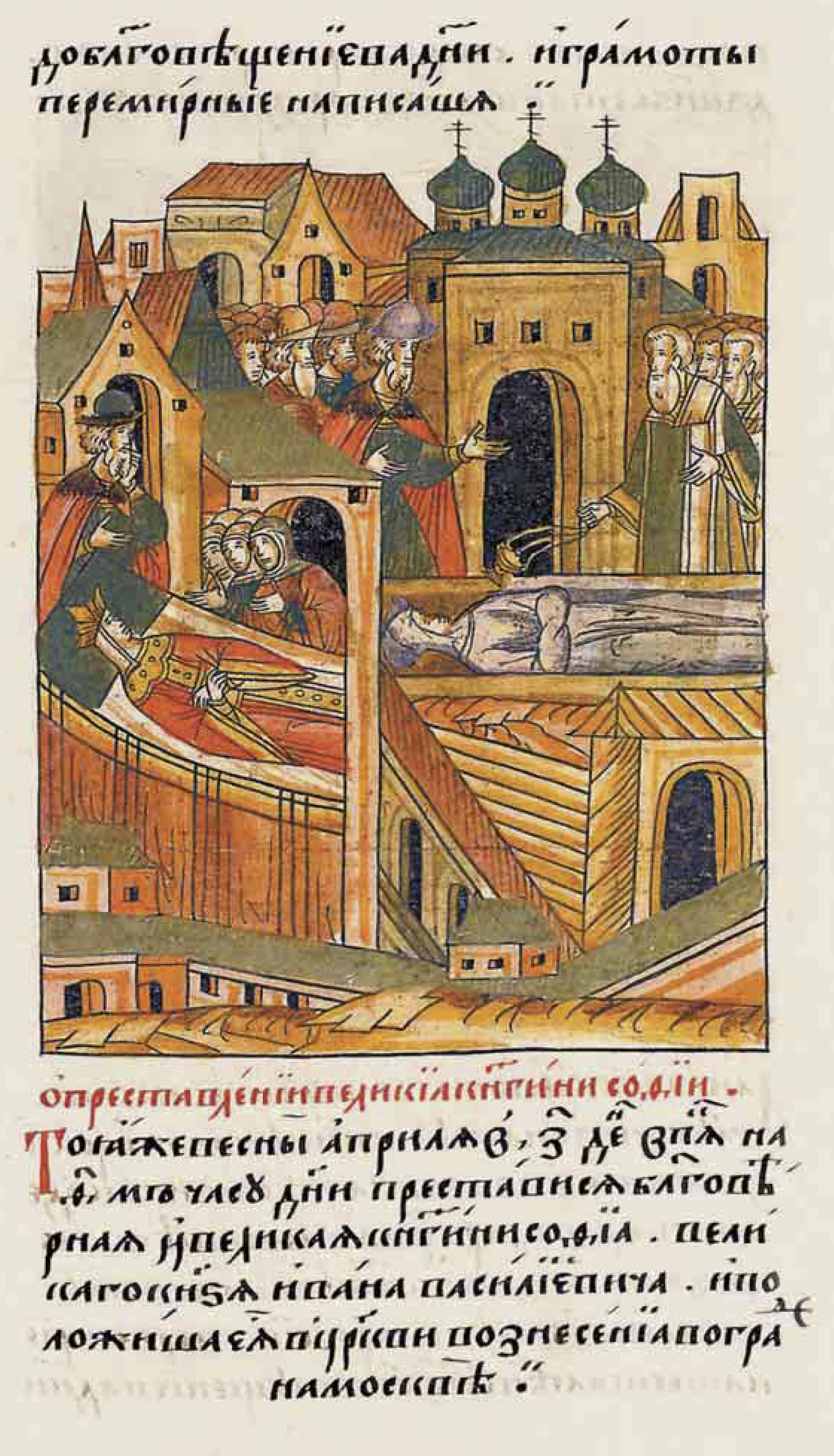 О кончине великой княгини Софьи. В ту же весну апреля в 7 день в пятницу, на 9 часу дня, скончалась благоверная и вели- кая княгиня Софья, великого князя Ивана Васильевича, и по- ложили ее в церкви Вознесения в городе Москве.